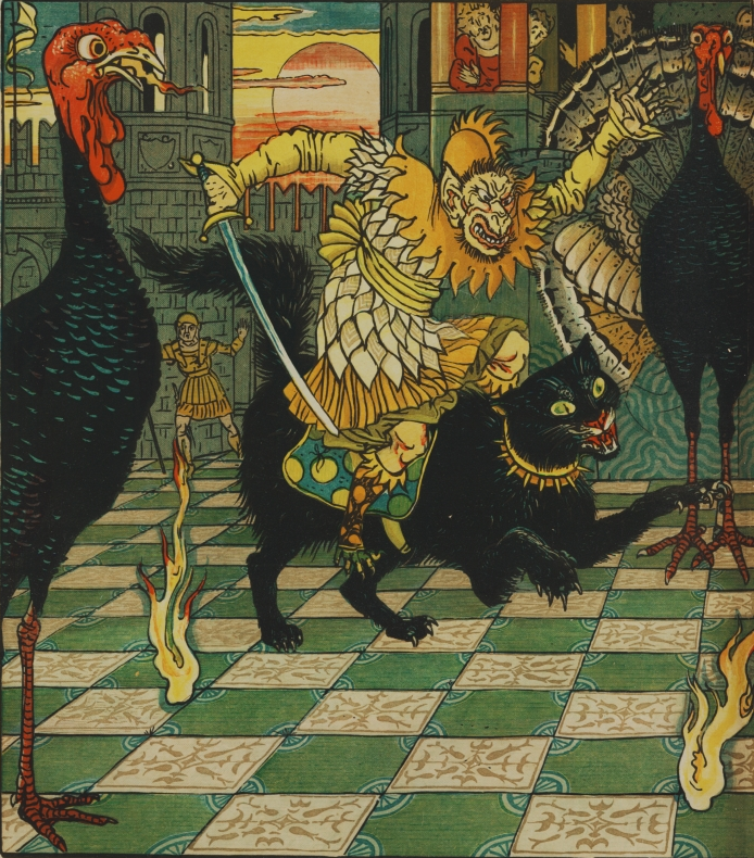 Walter Crane, The yellow dwarf, 10